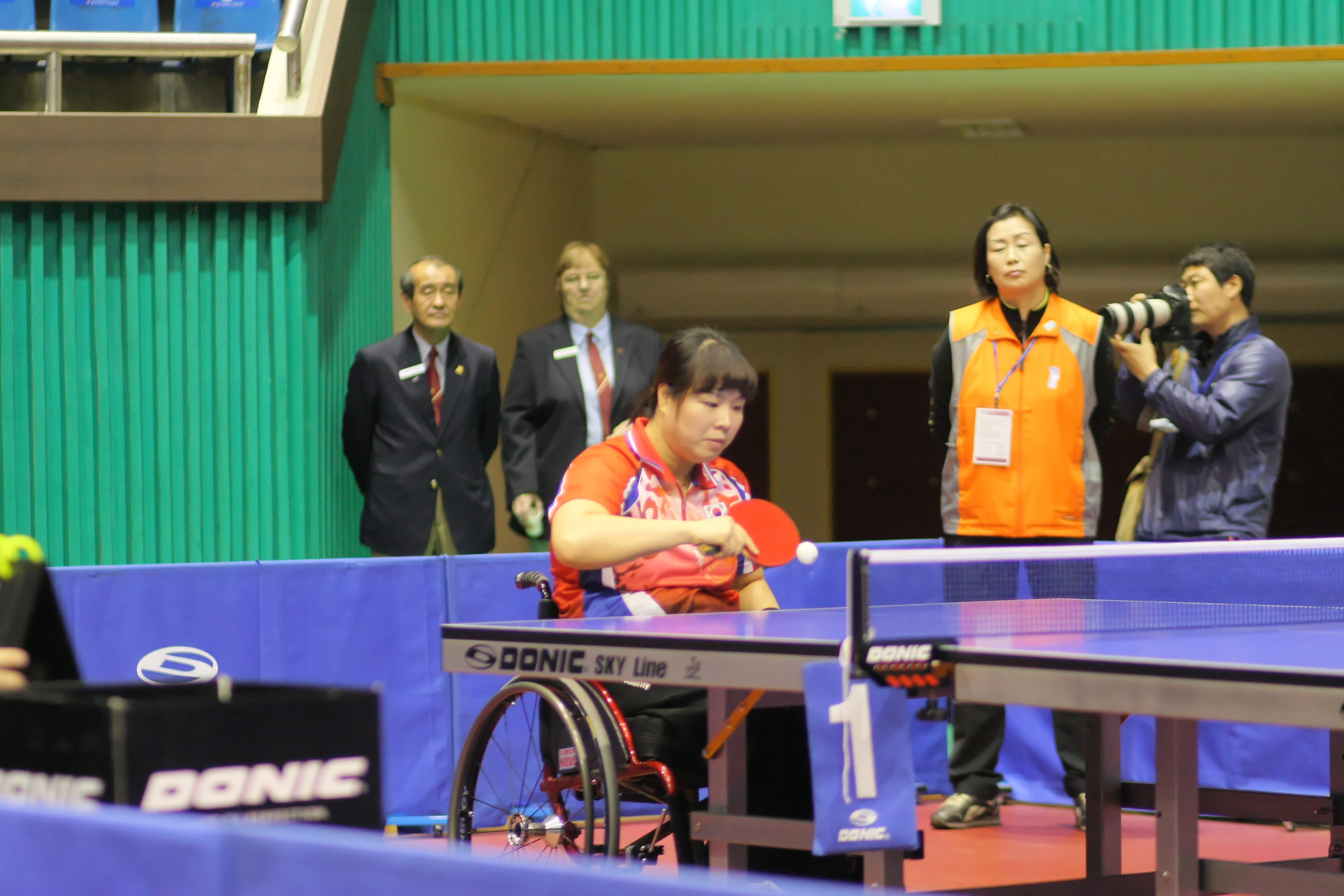 IMG_7726_DxO